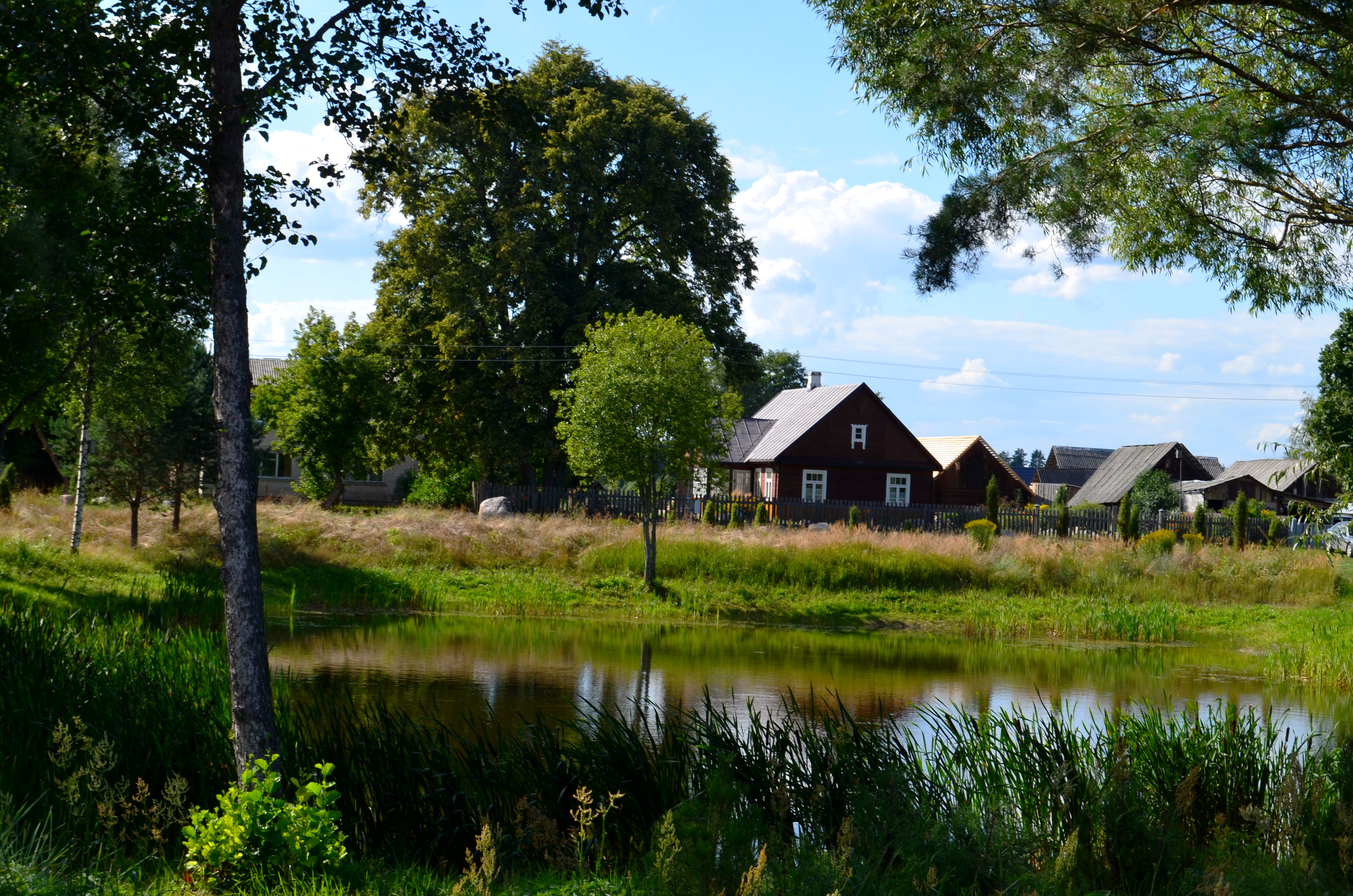 Šunupis, Varėnos raj.